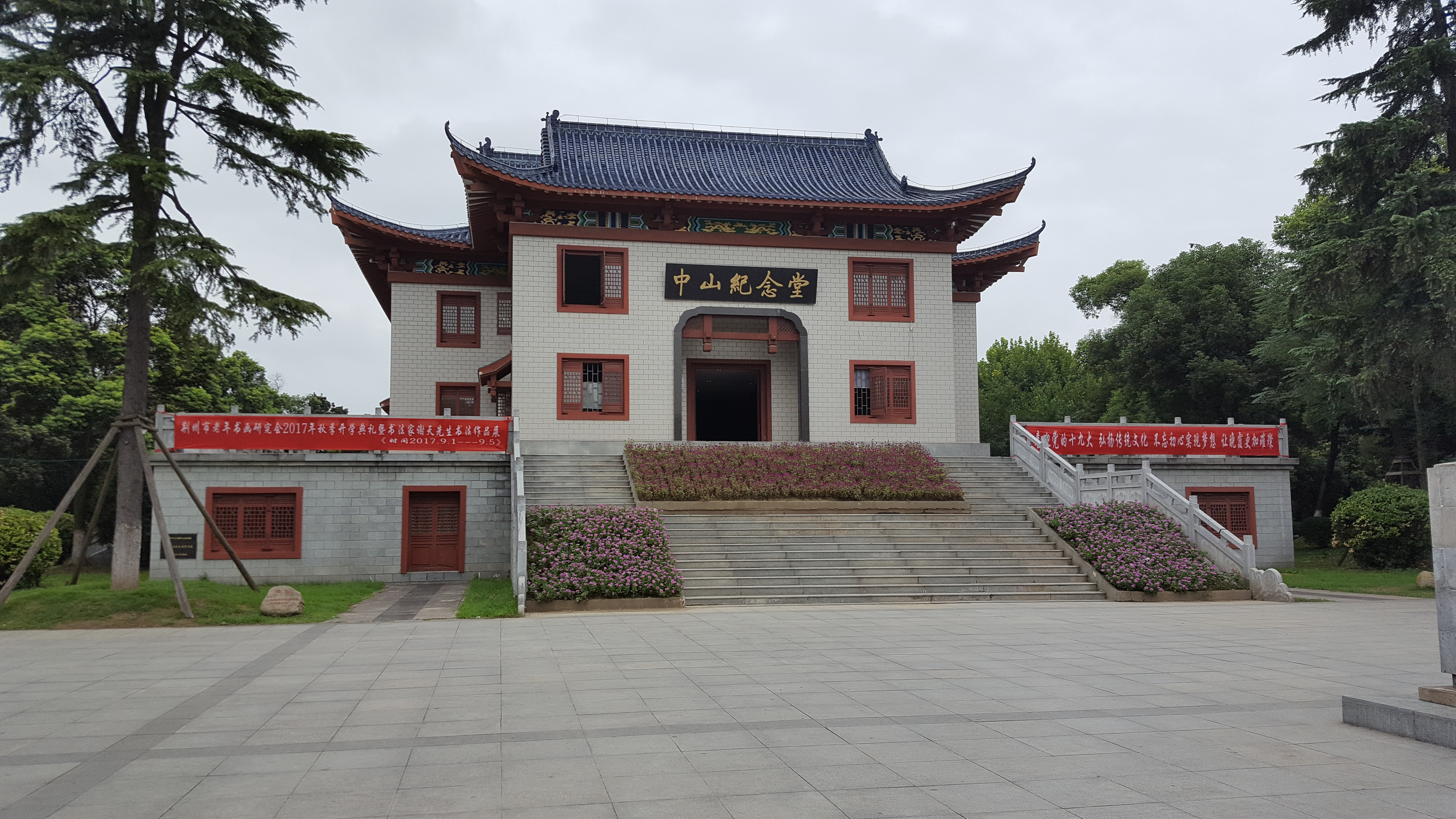 中文（中国大陆）: 荆州市沙市市中山公园中山纪念堂